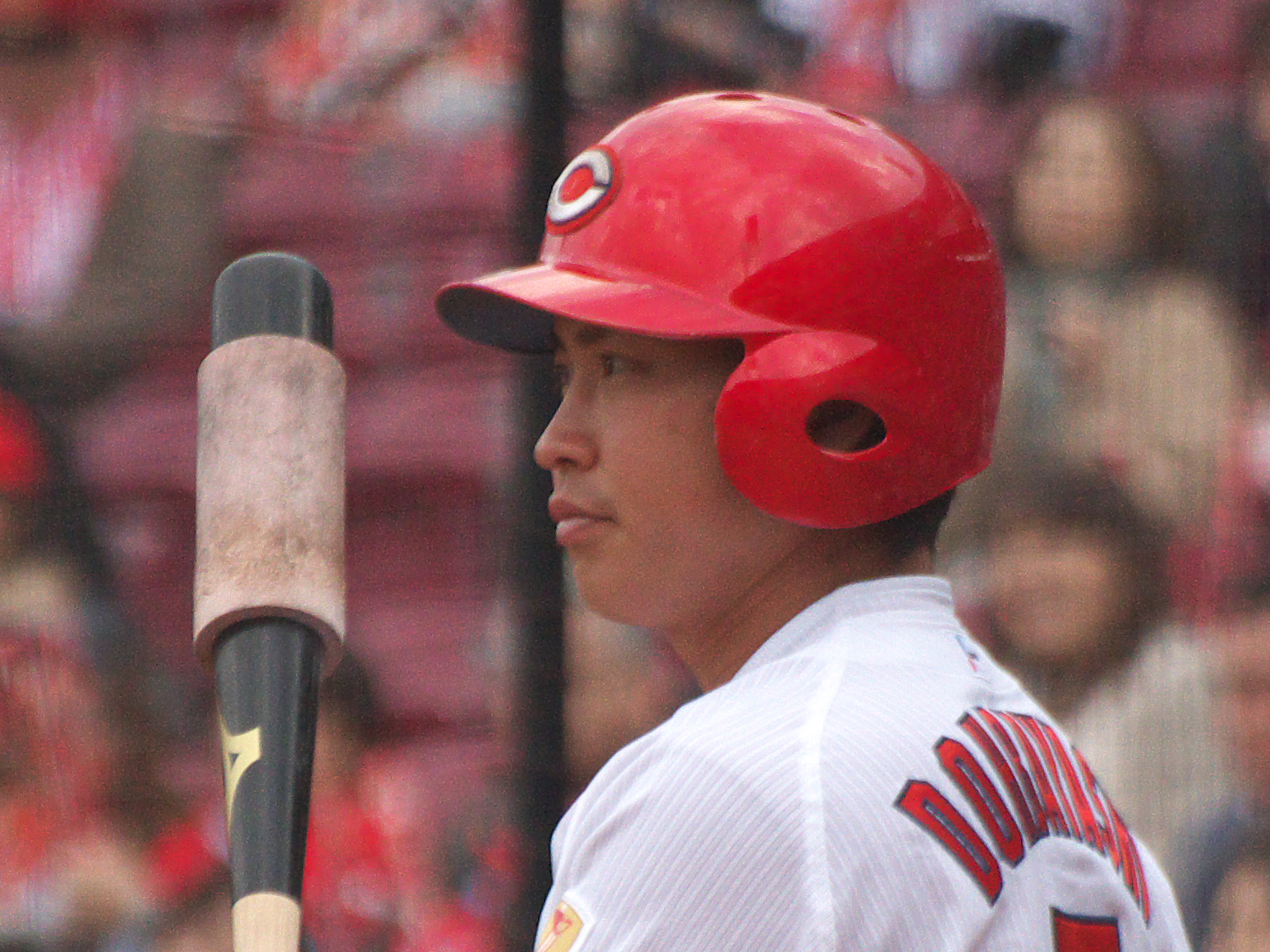 広島東洋カープ堂林翔太